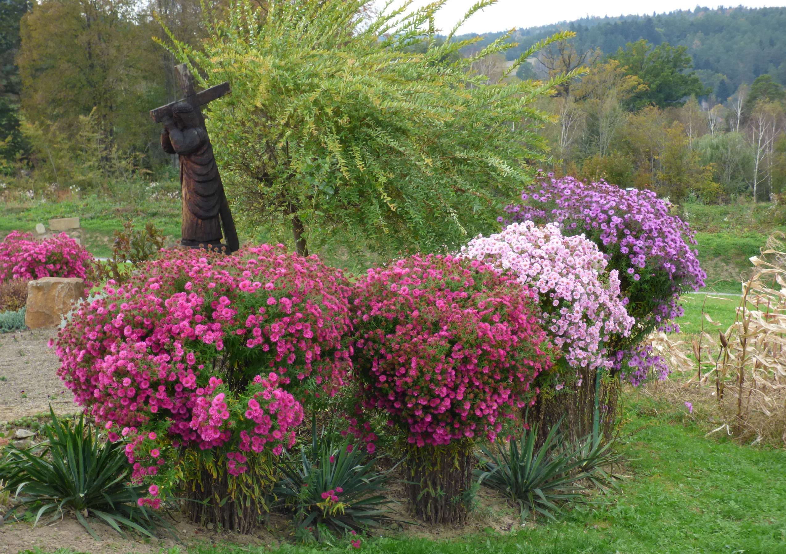 Aster nowoangielski. (Aster novae-angliae) Aster nowoangielski lub aster amerykański. Marcinki nowoangielskie (Symphyotrichum novae-angliae)